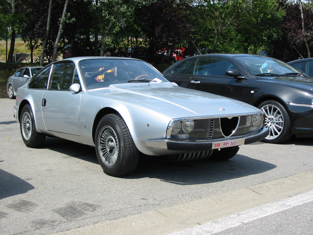 Alfa Romeo Zagato Junior